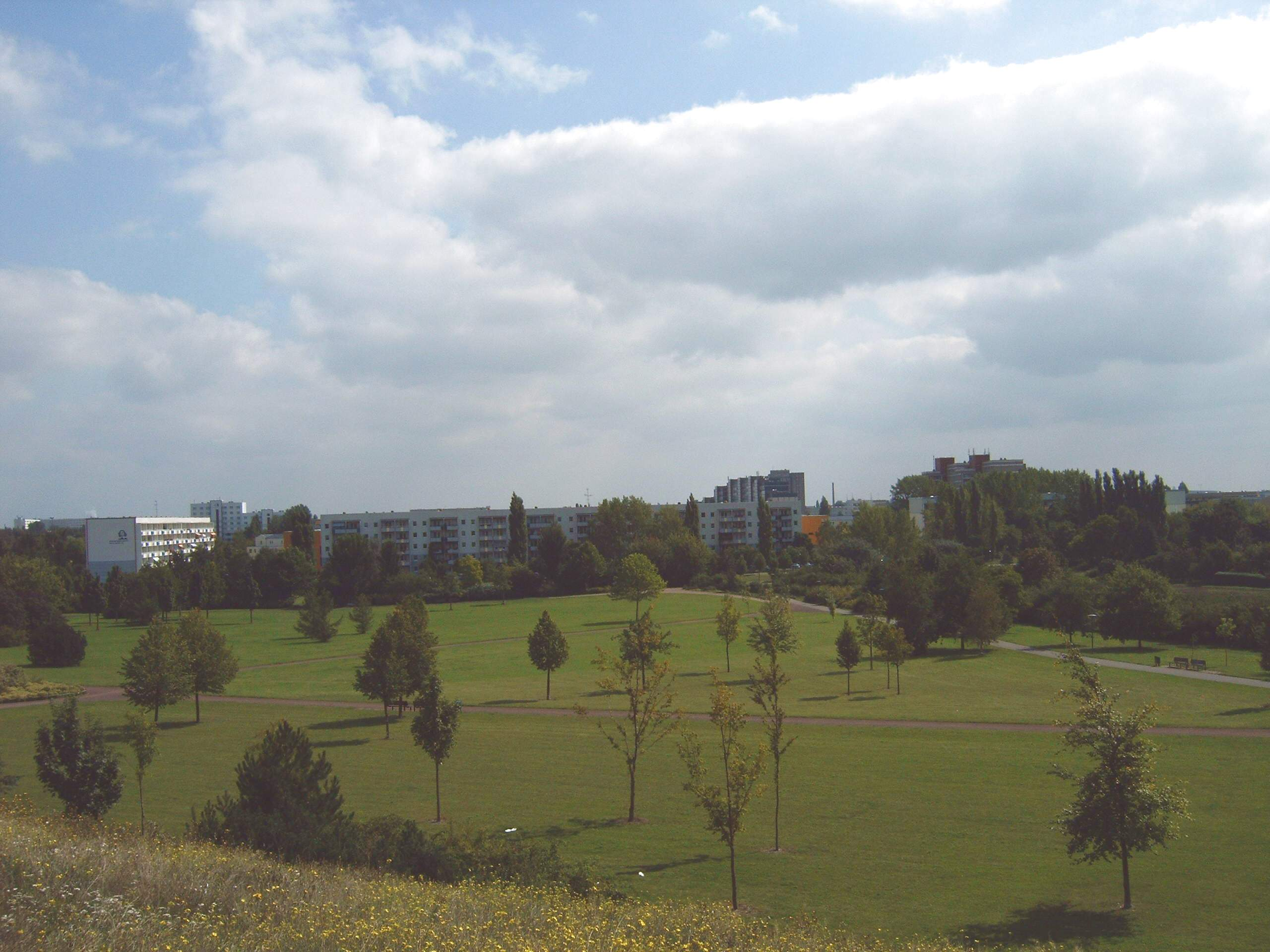 Florapark in Magdeburg, östlicher Teil